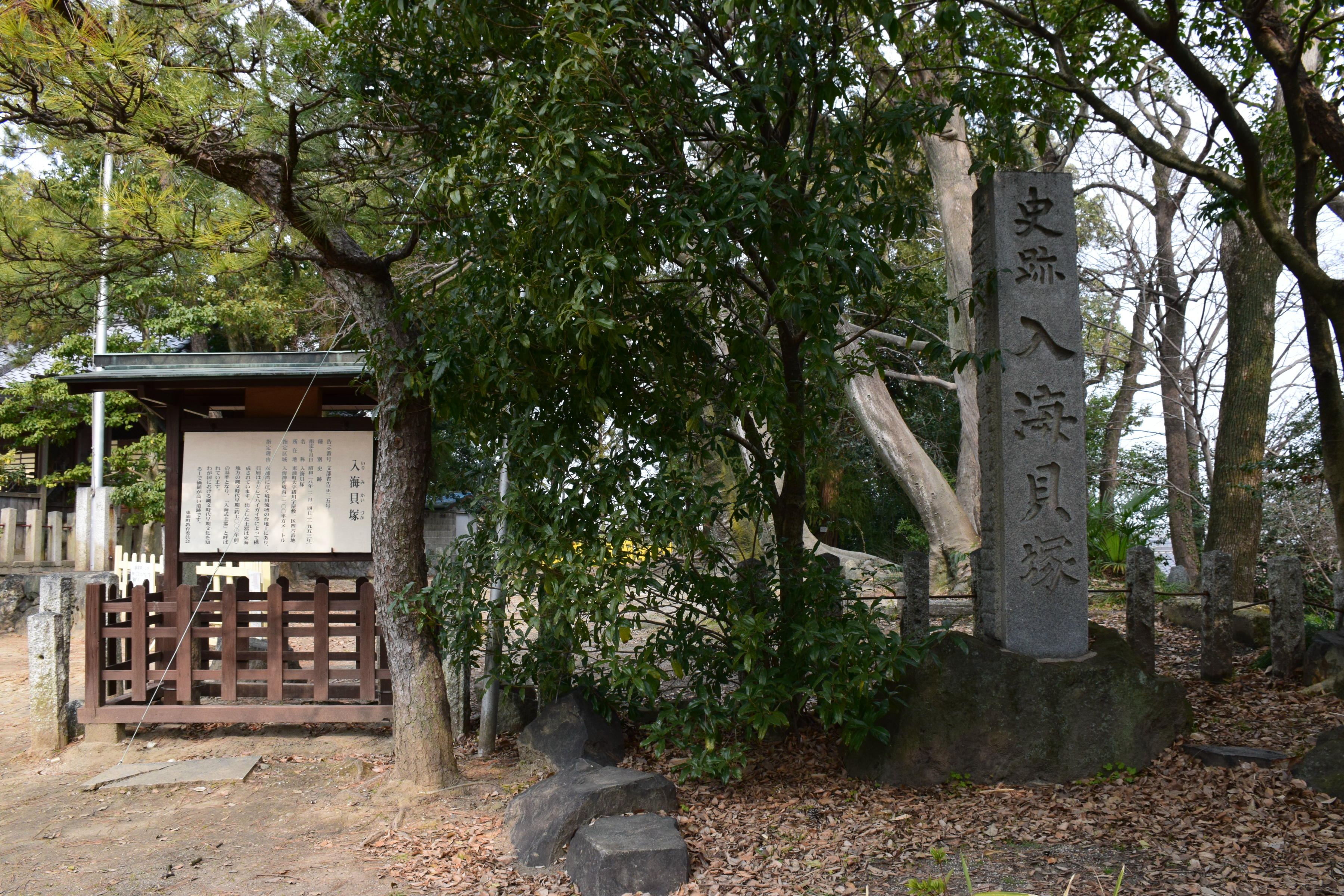 史跡入海貝塚